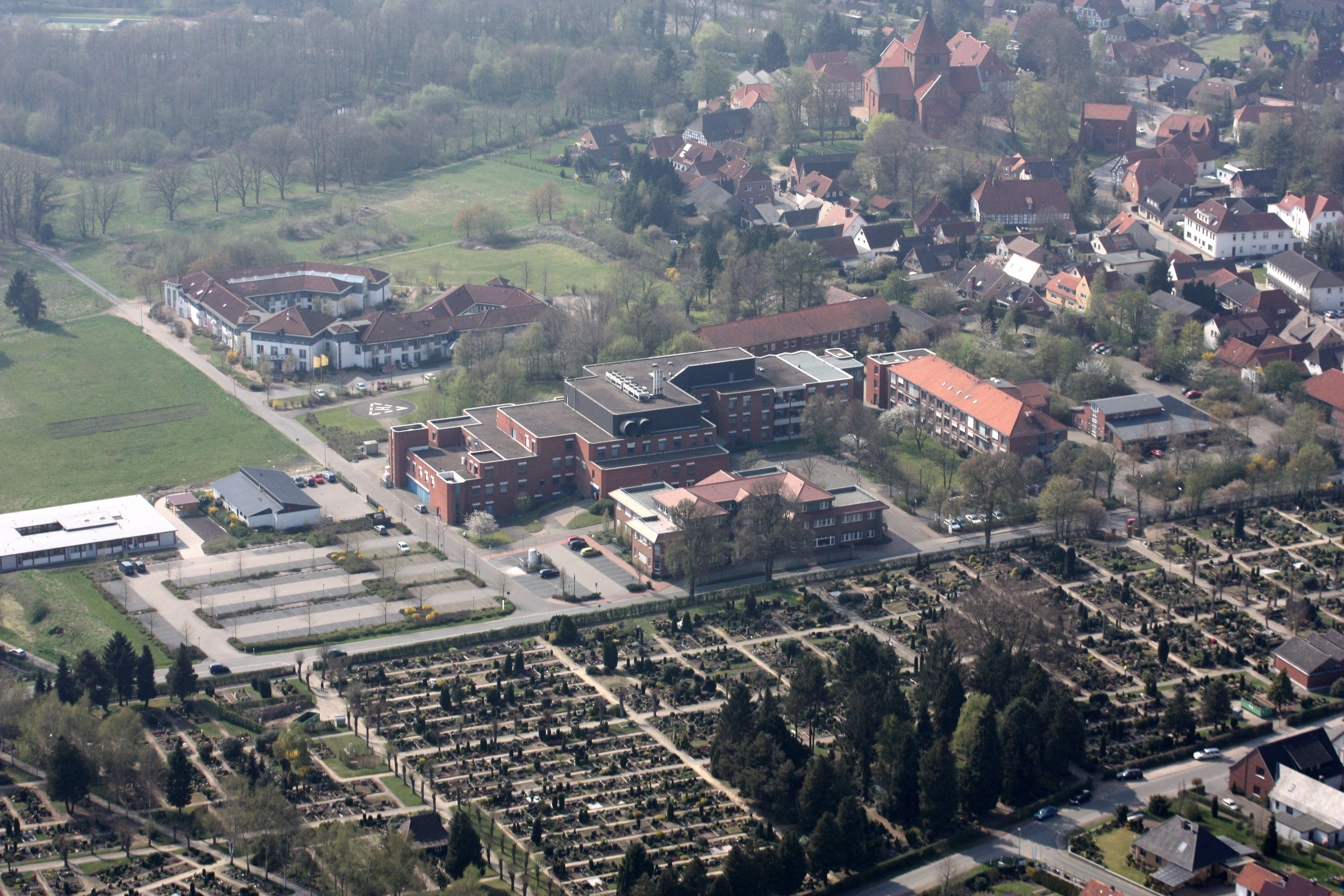 Luftbilde von Bassum